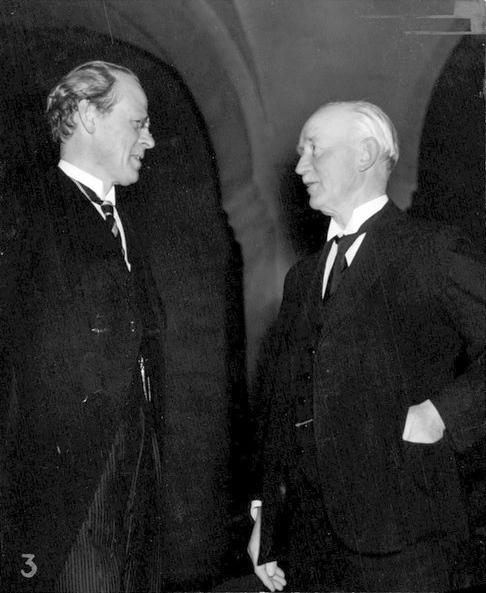 Underståthållare K. G. Sandström (till vänster) och riksdagsman G. Mosesson (till höger).